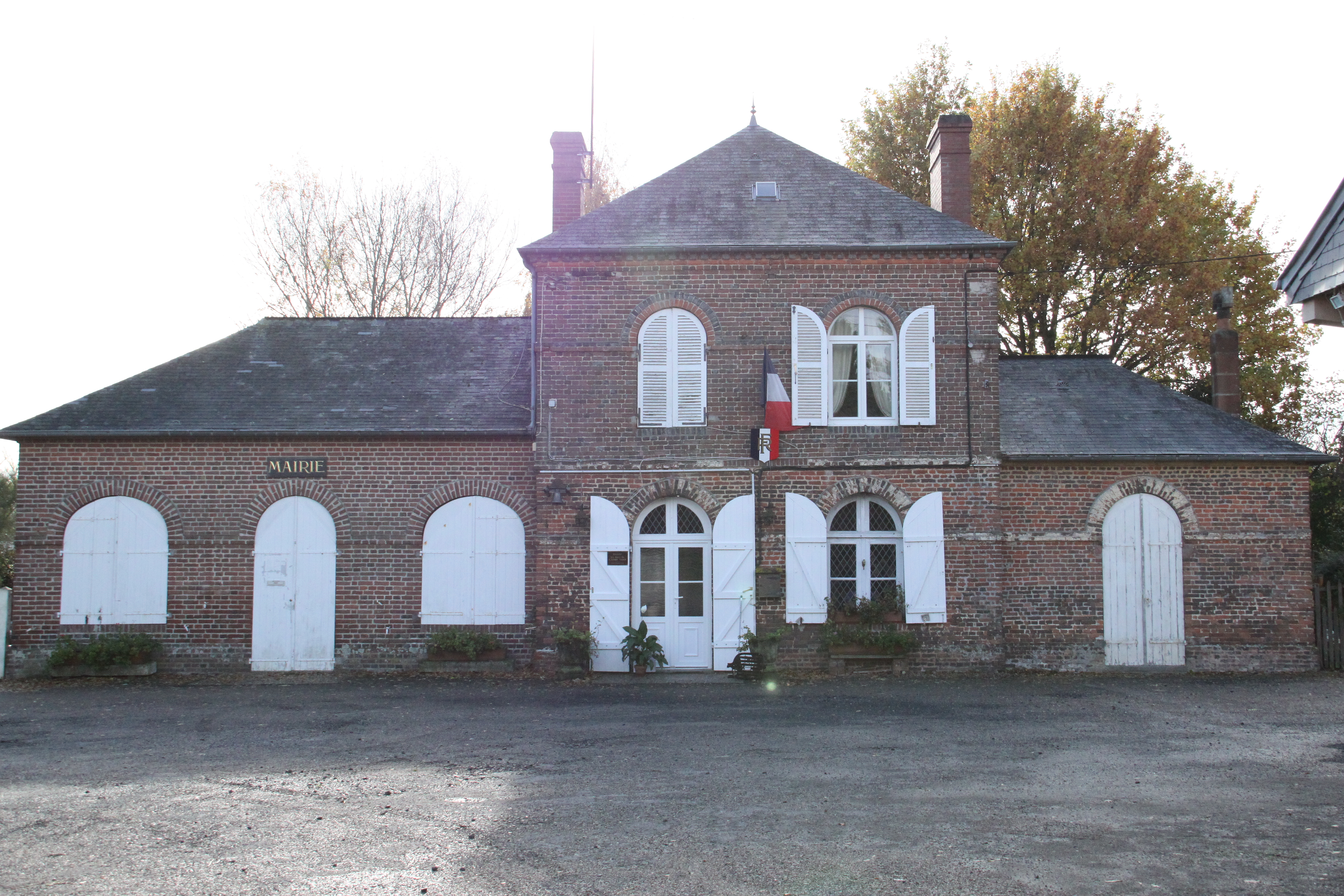 mairie du Mesnil-Germain, Calvados, France